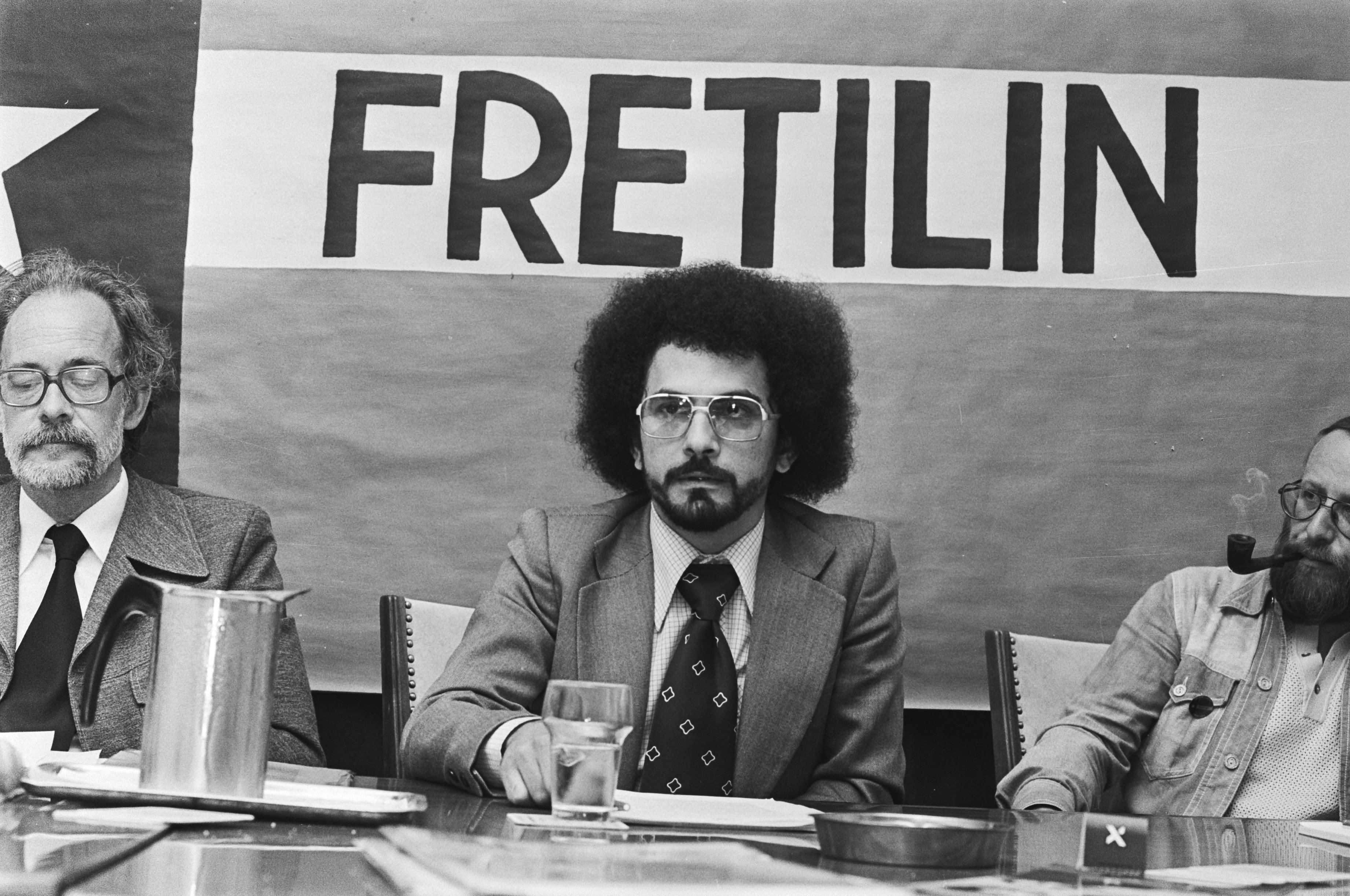 Collectie / Archief : Fotocollectie Anefo Reportage / Serie : [ onbekend ] Beschrijving : Persconferentie met Leonel Andrade (Fretilin) en Jose Ramos Horta (Minister Buitenlandse Zaken Oost-Timor en secretaris generaal Frelimo) in Krasnapolsky. Ramos Horta Datum : 8 juni 1976 Locatie : Amsterdam, Indonesië, Indonesië, Oost-Timor Trefwoorden : persconferenties, verzetsbewegingen Persoonsnaam : Andrade Leonel, Frelimo, Fretilin, Ramos Horta Jose Instellingsnaam : Krasnapolsky Fotograaf : Bogaerts, Rob / Anefo Auteursrechthebbende : Nationaal Archief Materiaalsoort : Negatief (zwart/wit) Nummer archiefinventaris : bekijk toegang 2.24.01.05 Bestanddeelnummer : 928-6310